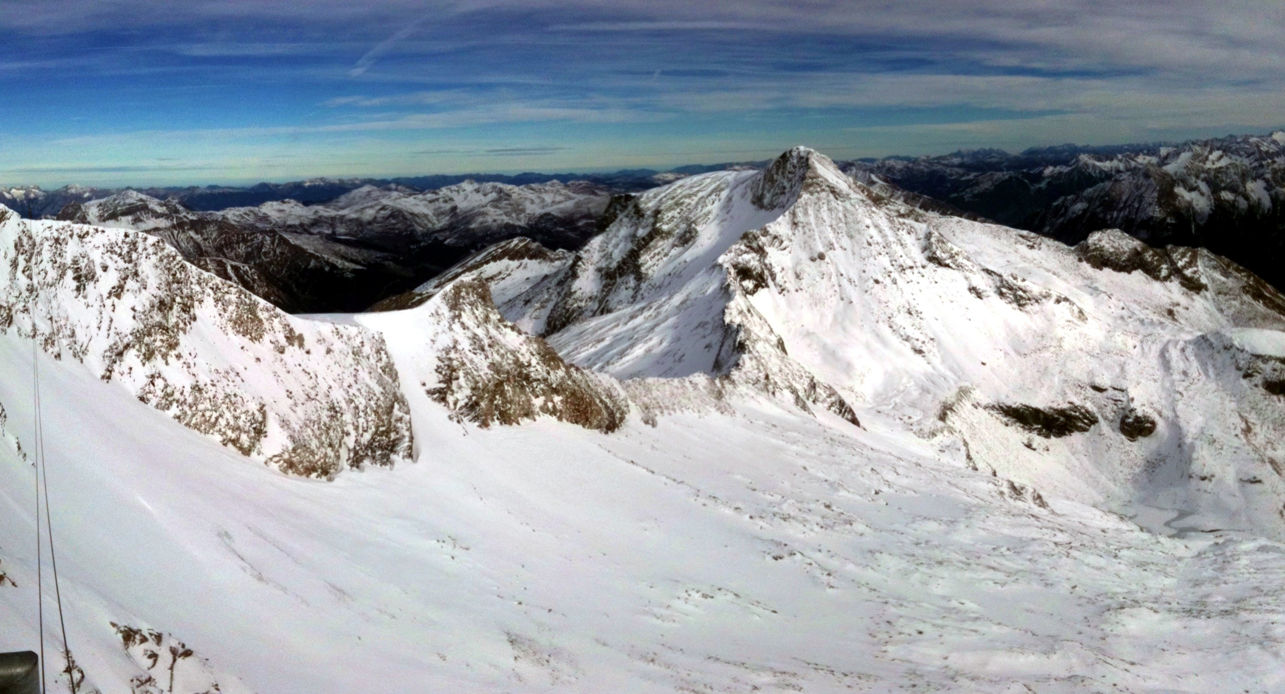 Hintertux